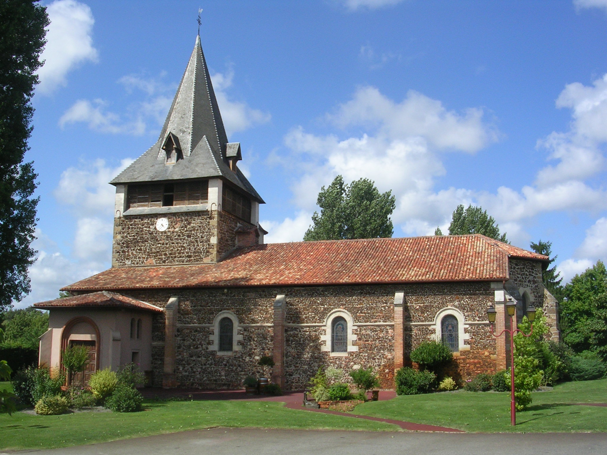 Église Saint-Martin de Pontenx-les-Forges, dans le département français des Landes